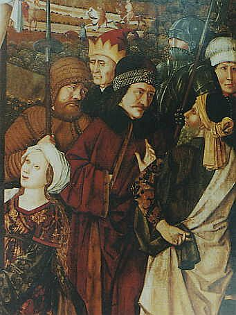 Meister von Maria am Gestade: Kreuzigung Christi. Ausschnitt von einem Altarflügelbild aus der Kirche Maria am Gestade in Wien, um 1460, Ölmalerei auf Holz, 202 x 161 cm. Die Gestalt von Vlad Tepes (der Mann mit der perlenbesetzten Mütze) misst ca. 110 cm.